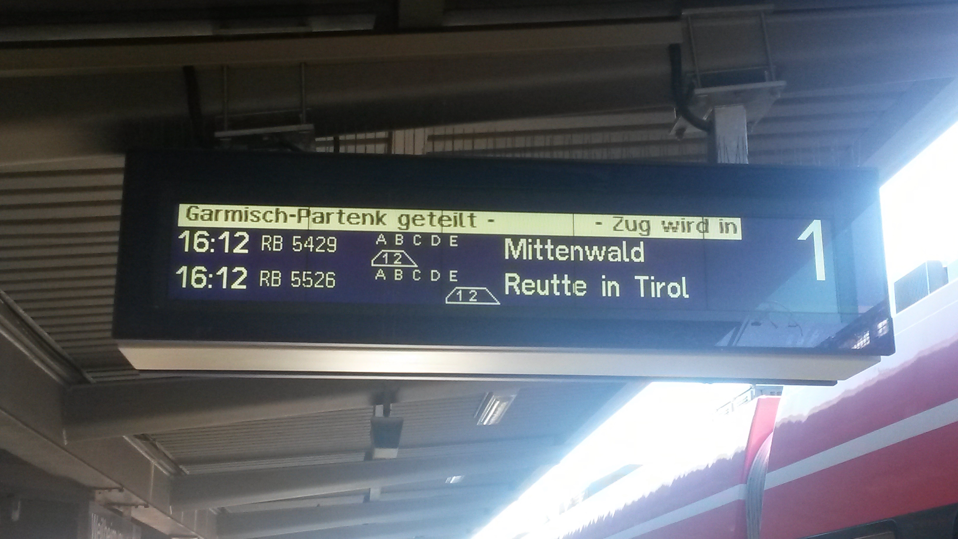 Copyright: DB AG